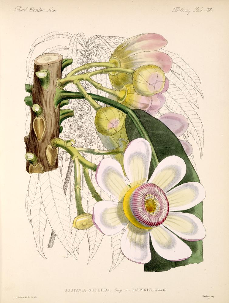 Illustration of Gustavia superba (Orig. Gustavia superba var. salviniae)